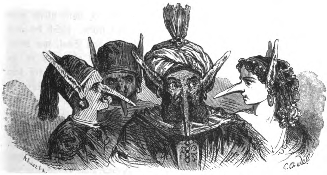 Szene aus Die Geschichte von dem kleinen Muck: Dem König und seinem Hofstaat wachsen nach dem Genuss von Mucks Feigen riesige Ohren und Nasen